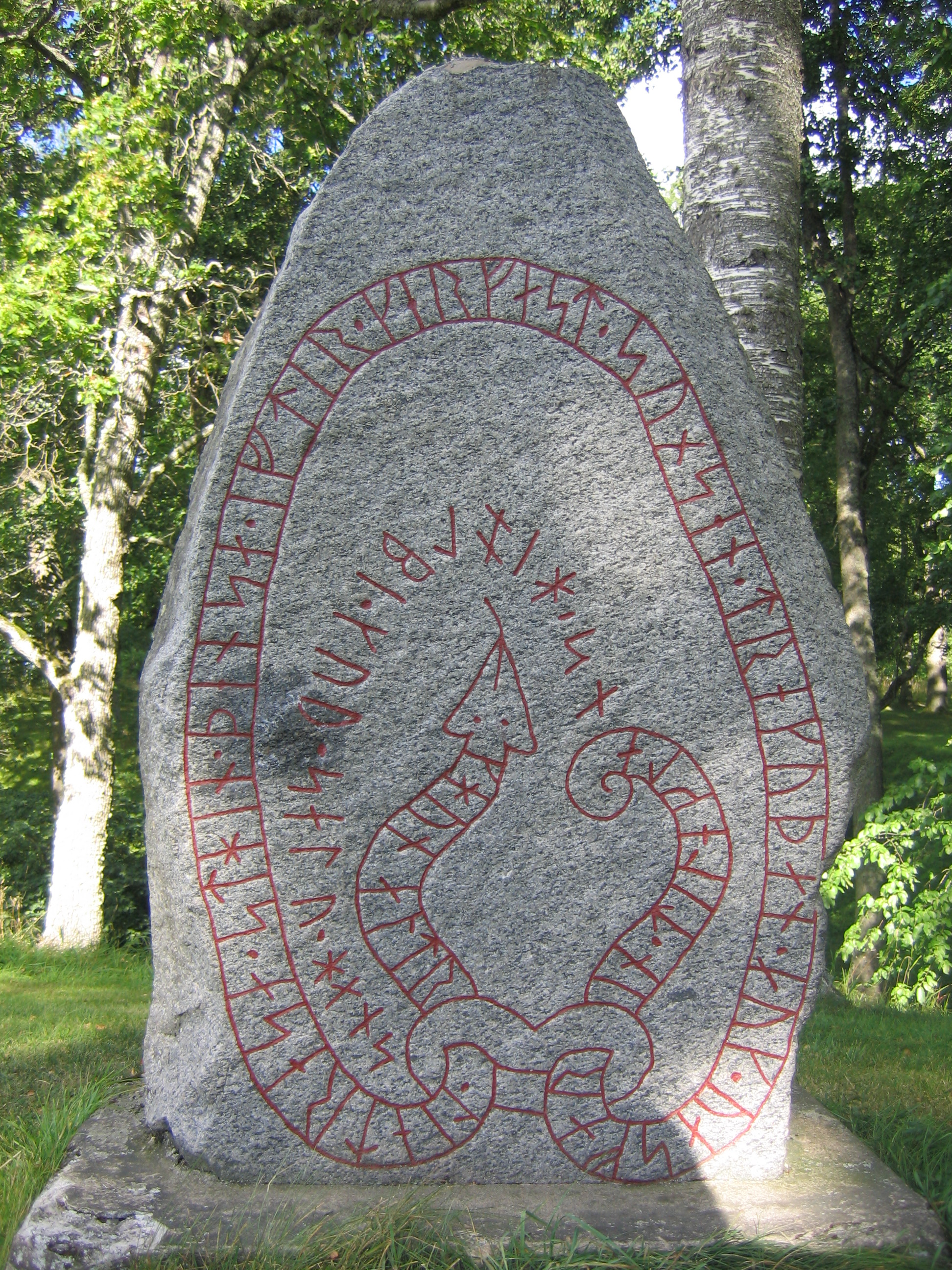 runestone Vs 18 in Berga, Västerås.